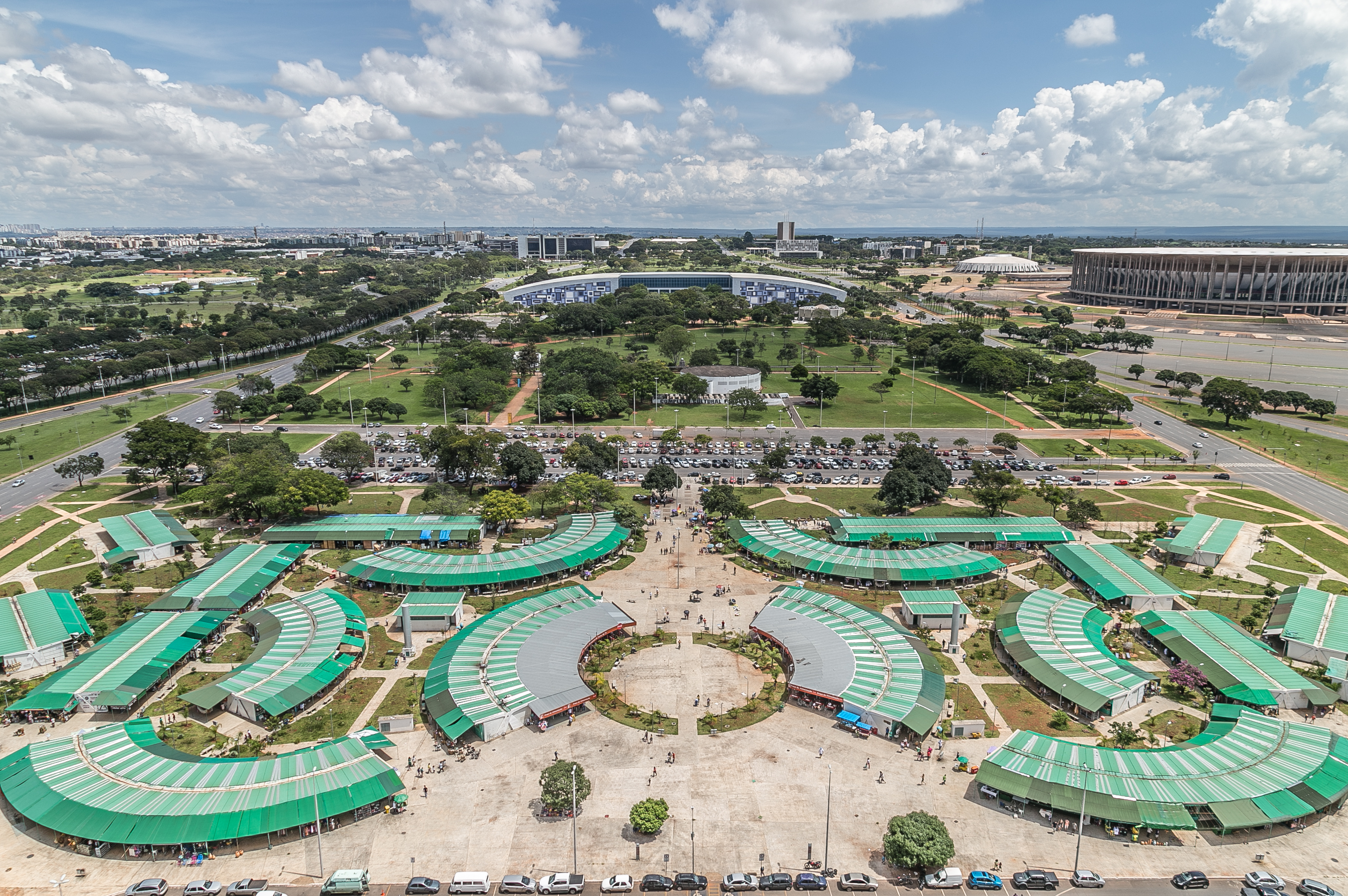 Conjunto urbanístico de Brasília construído em decorrência do Plano Piloto traçado para a cidade